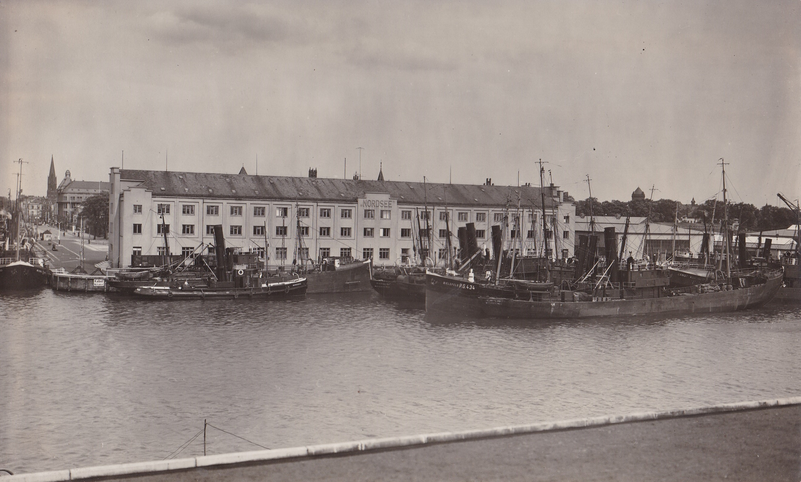 Postkarte mit Fischdampfern vor dem Verwaltungsgebäude der Nordsee Deutsche Hochseefischerei am Handelshafen in Geestemünde.